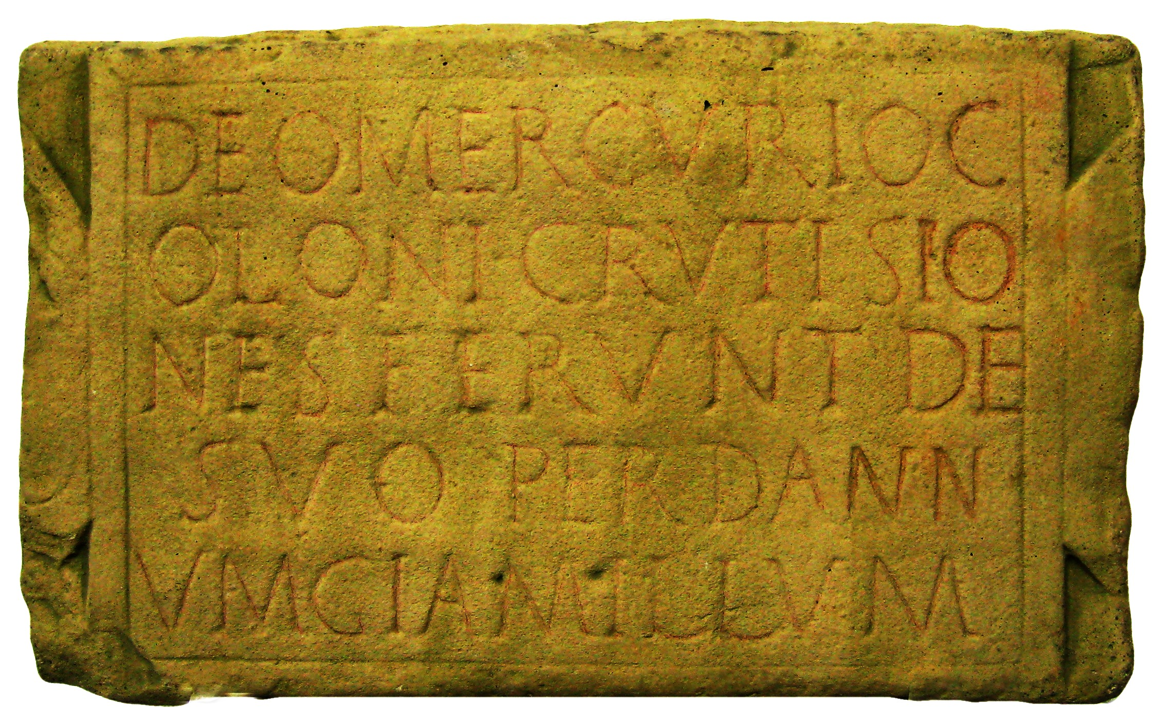 Merkur-Stein im Museum Pachten DEOMERCURIOC OLONICRVTISIO NESFERVNTDE SVOPERDANN VMGIAMILLVM Dem Gott Merkur errichteten dies von sich aus die Kolonnen von Crutisio durch Dannus Giamillus